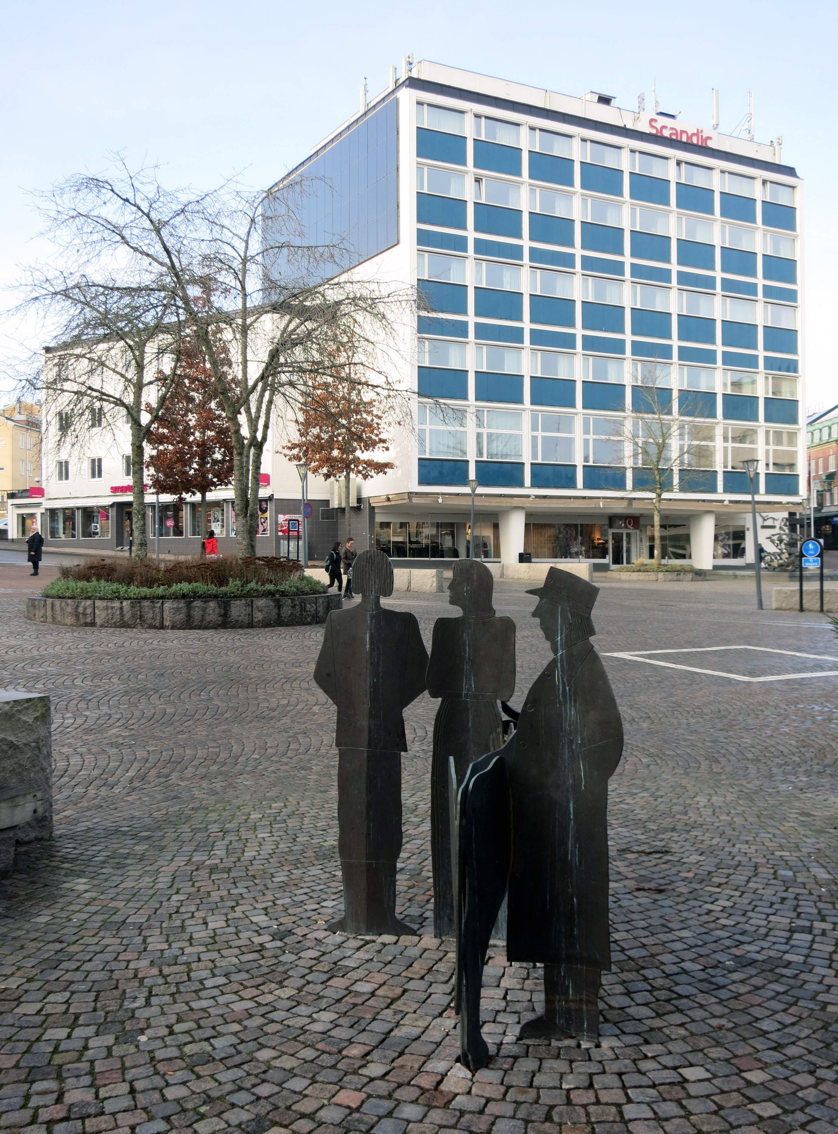 Hotell Statt, numera Scandic, Värnamo. Invigt 1955